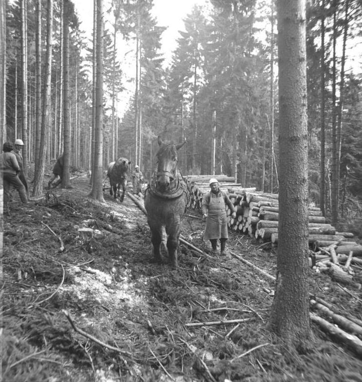 ADN-ZB/Schaar/26/3/82/Bez. Suhl: Sechs Brigaden der LPG Römhild sind seit Anfang Januar dabei, den Forstarbeitern bei der Beseitigung der schweren Schneebruchschäden zu helfen. Die Römilder Bauern haben bisher schon 600 Festmeter Bruchholz gerückt, auf Längen geschnitten und zum Abtransport bereitgestellt. Pferde bringen die Stämme zum Schneidplatz.